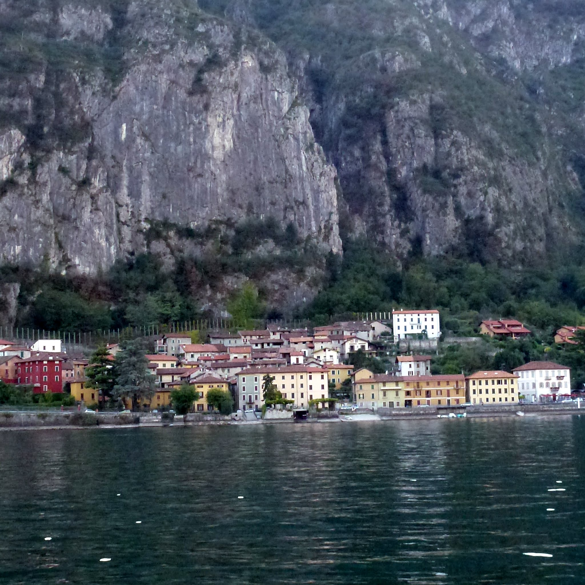 Vista di Onno sul lago di Como.